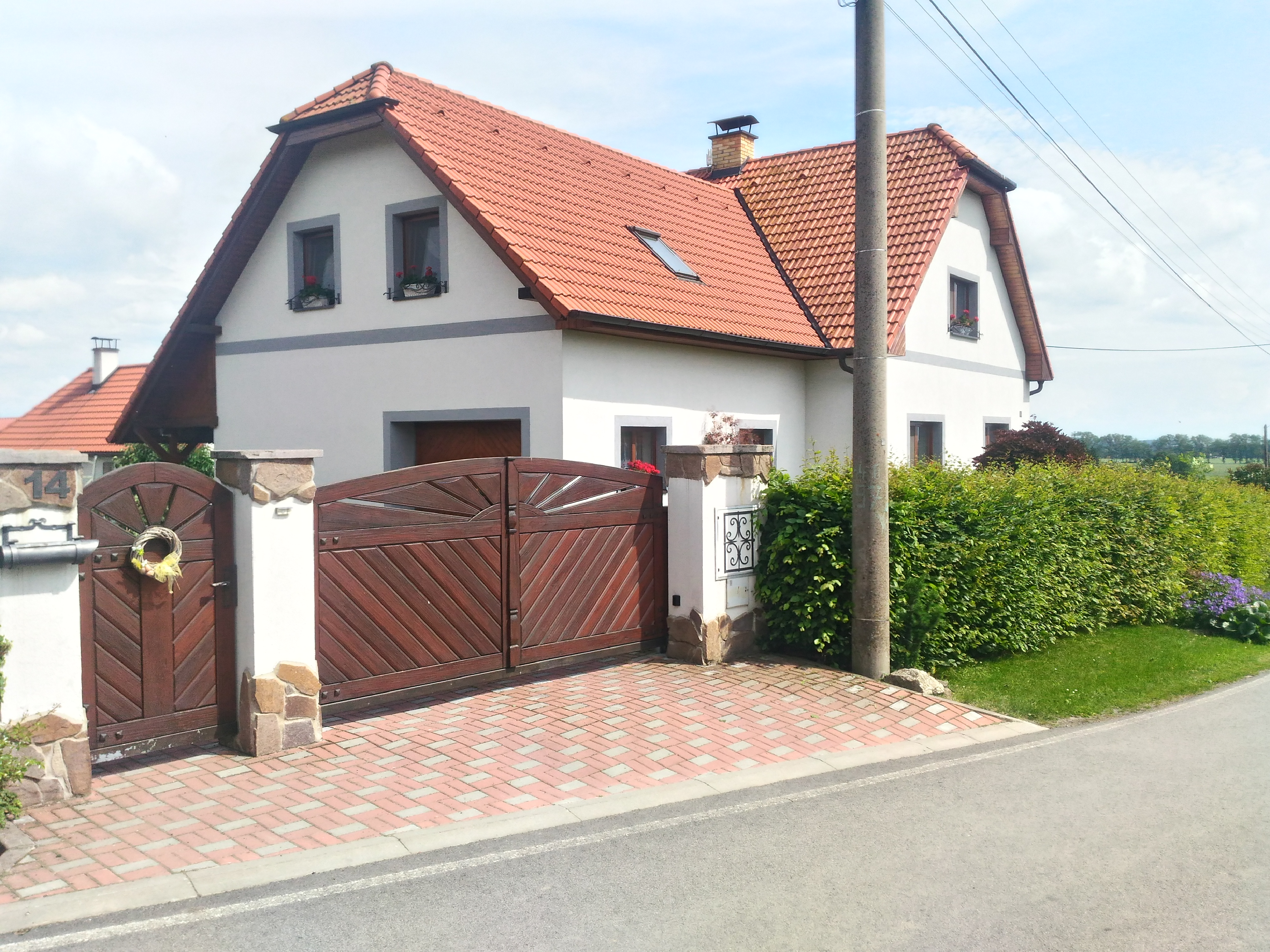 Paseka, okres Tábor, Česká republika